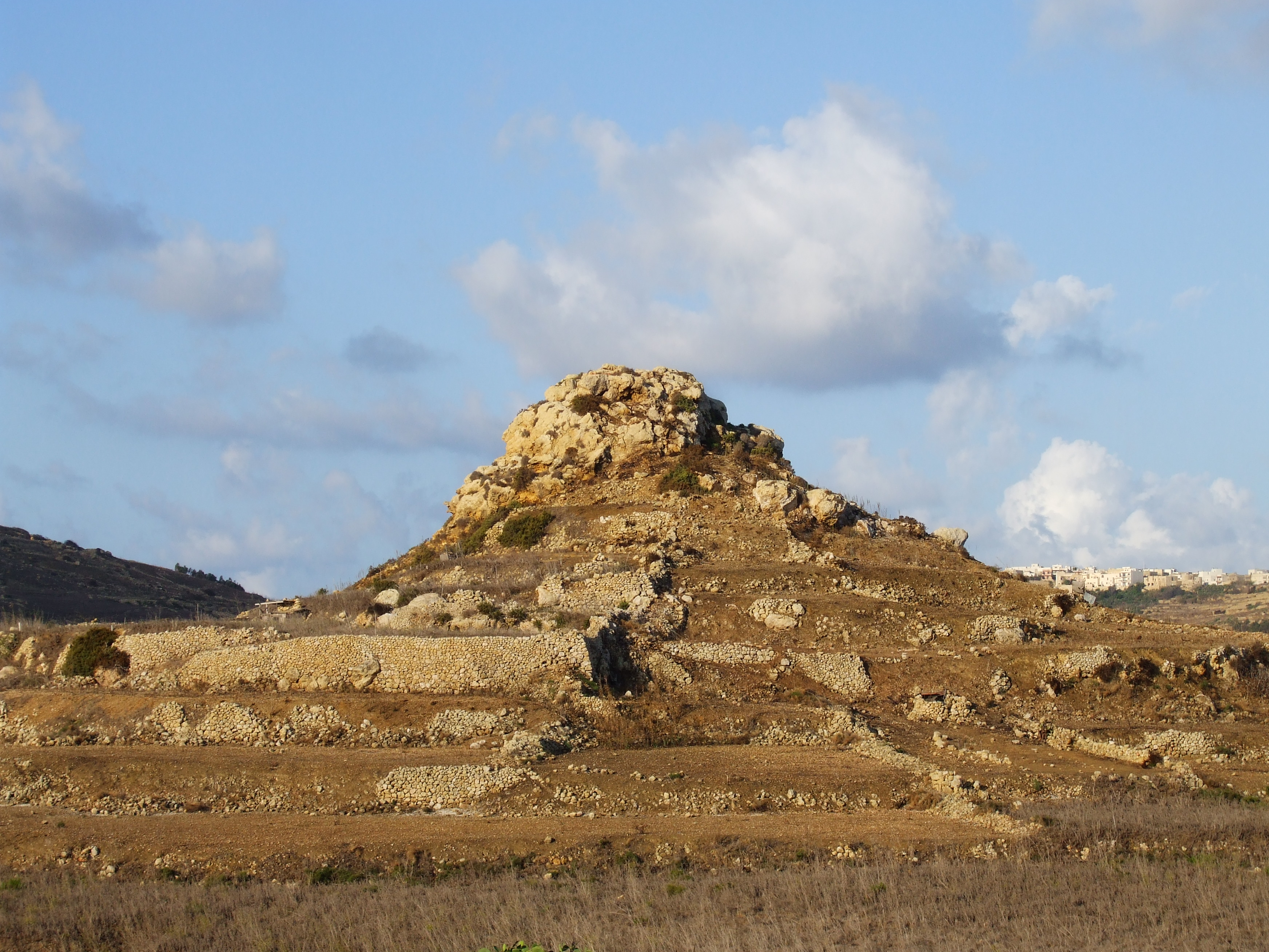 Il-Qolla s-Safra